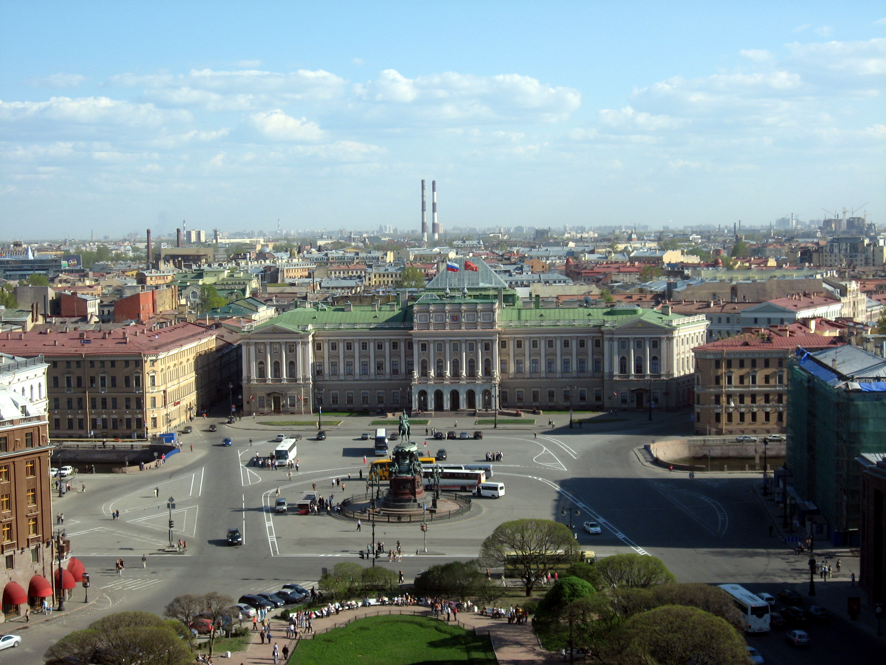 Sankt-Petěrburg, výhled z Katedrály svatého Izáka